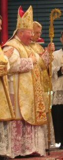 Mgr Wolfgang Haas